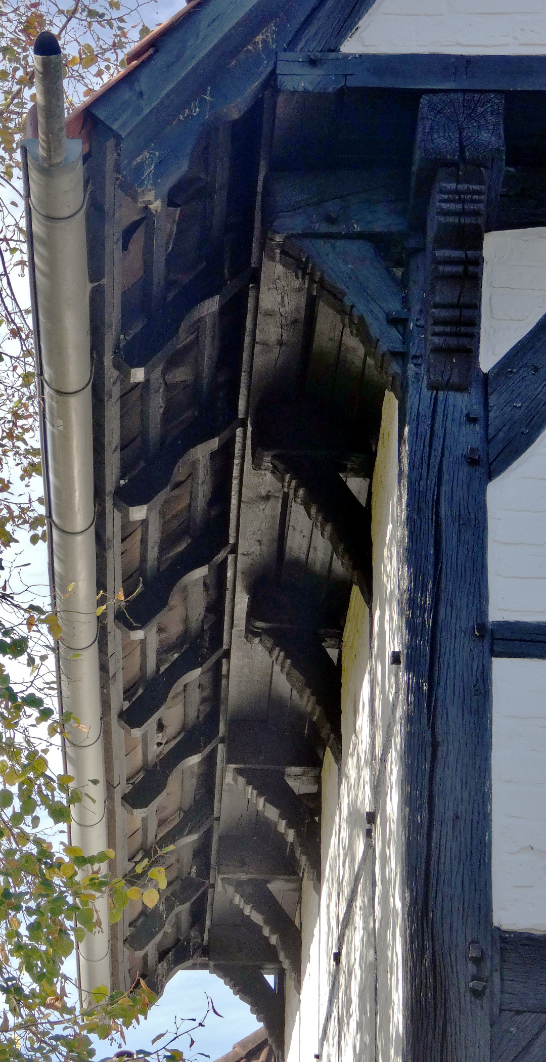 Die Dachunterseite mit den bei Mitthoff zur Datierung herangezogenen gegliederten Konsolen